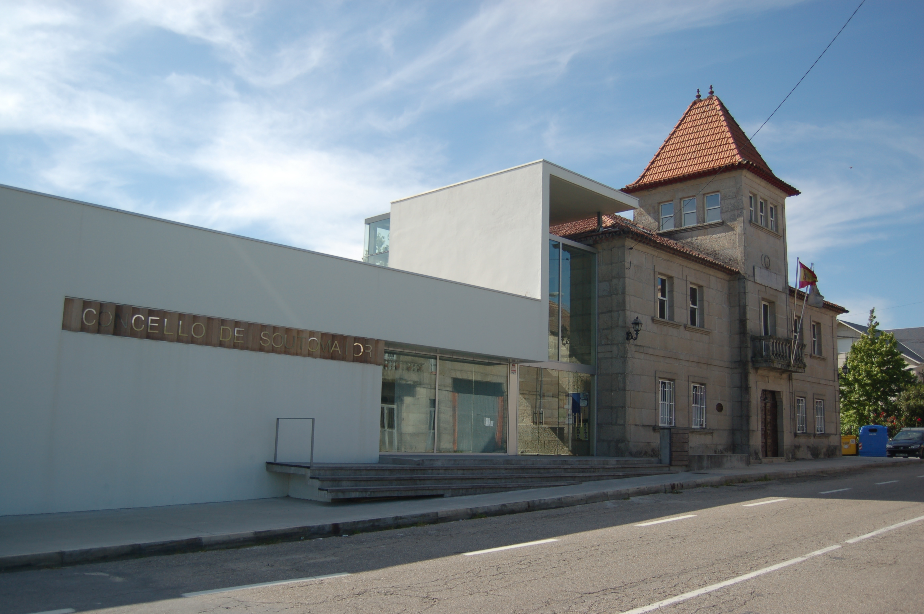 Casa consistorial de Soutomaior